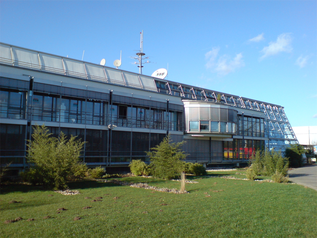 Funkhaus der Radio/Tele FFH GmbH & Co. Betriebs-KG, Bad Vilbel